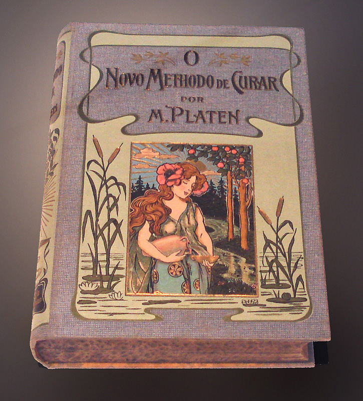 Livro "O Novo Methodo de Curar", de M. Platen. Acervo do Museu de História da Medicina do RS, Porto Alegre, Brasil